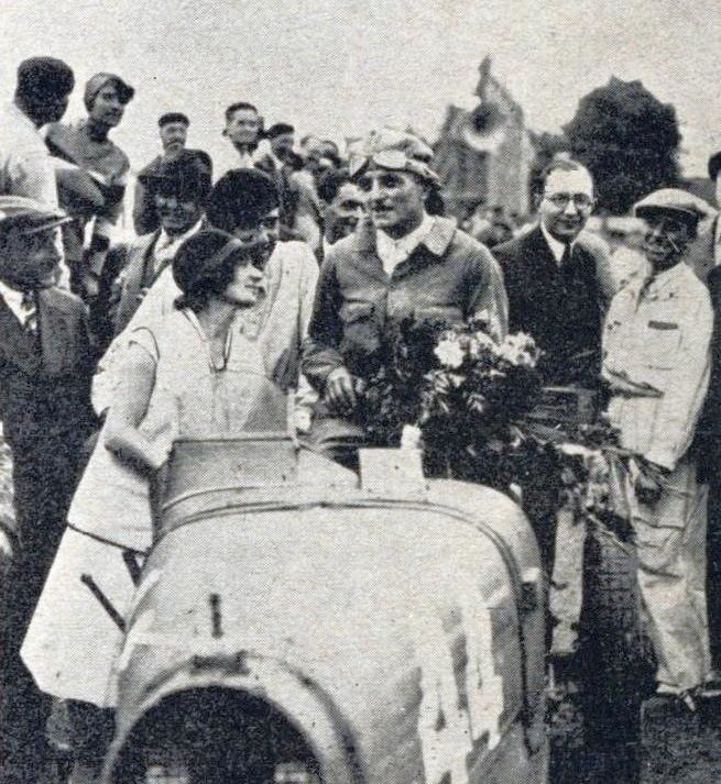 Philippe Étancelin félicité par son épouse à l'arrivée du Grand Prix de l'ACF 1930.